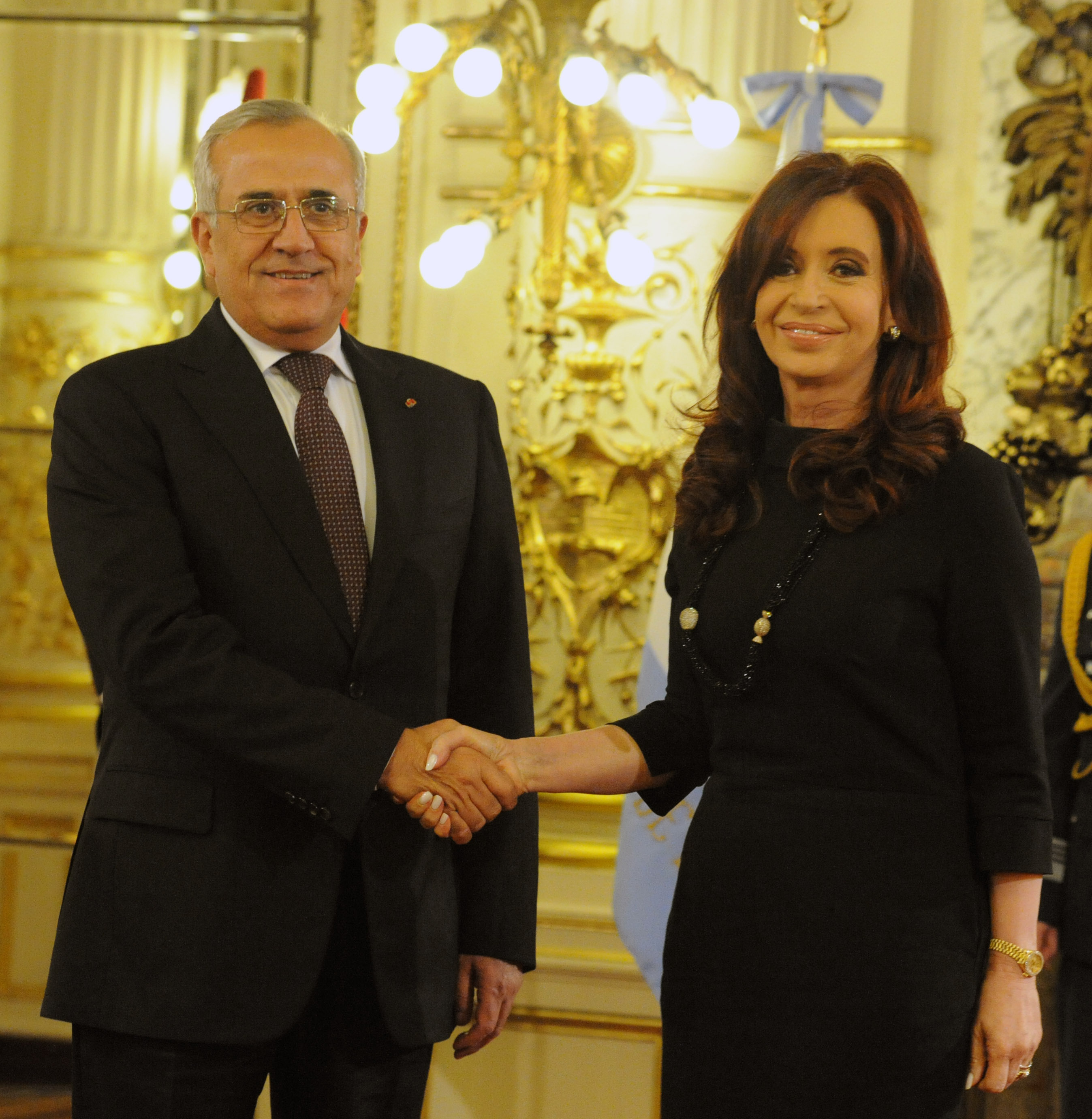 La presidenta Cristina Fernández recibió esta tarde en Casa de Gobierno a su par de la República Federativa del Líbano, general Michel Sleiman, con quien mantuvo una audiencia privada y firmó acuerdos de cooperación. En la declaración conjunta, ambos mandatarios ratificaron la decisión de integración entre las dos naciones. La Jefa de Estado agradeció además el apoyo libanés y de todo el mundo árabe al reclamo argentino por la soberanía de Malvinas.